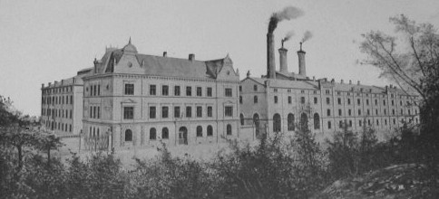 Hamburgerbryggeriet vid Surbrunnsgatan i Stockholm, bryggeriet vid 1880-talet